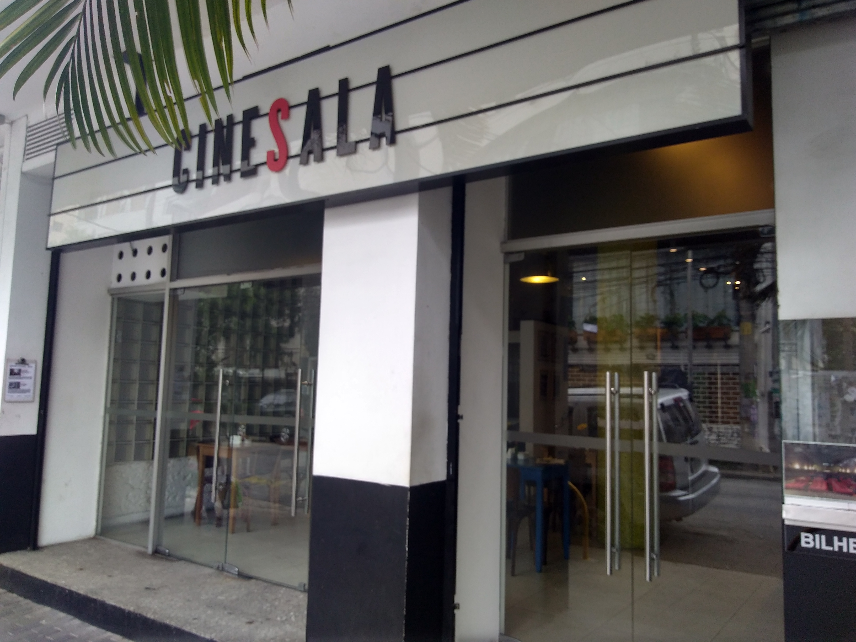 Vista lateral da fachada do Cine Sala da Rua Fradique Coutinho, cidade de São Paulo, SP